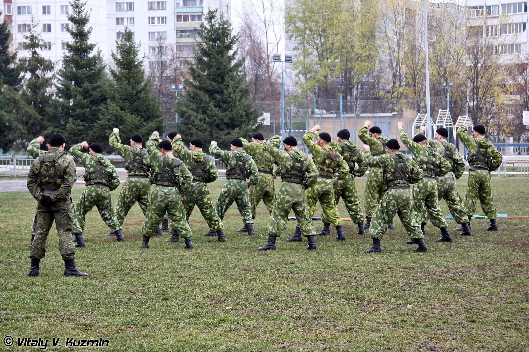 Показательное выступление разведроты 27-й отдельной гвардейской Севастопольской мотострелковой бригады (27th Separate Guards Sevastopolskaya Motor Rifle Brigade Recon Company show)